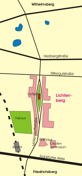 Zeichnung Loeperplatz in Berlin-Lichtenberg um 1904